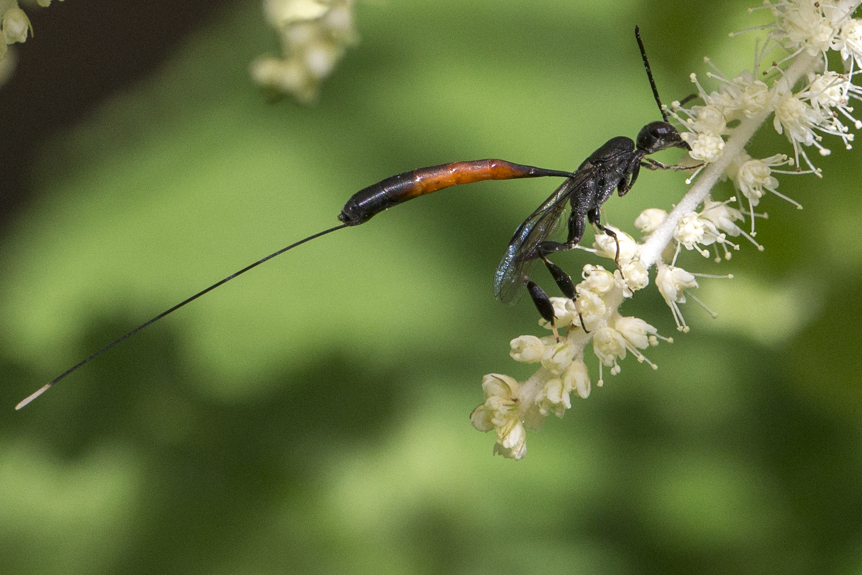 Gasteruption jaculator Lodz(Poland)